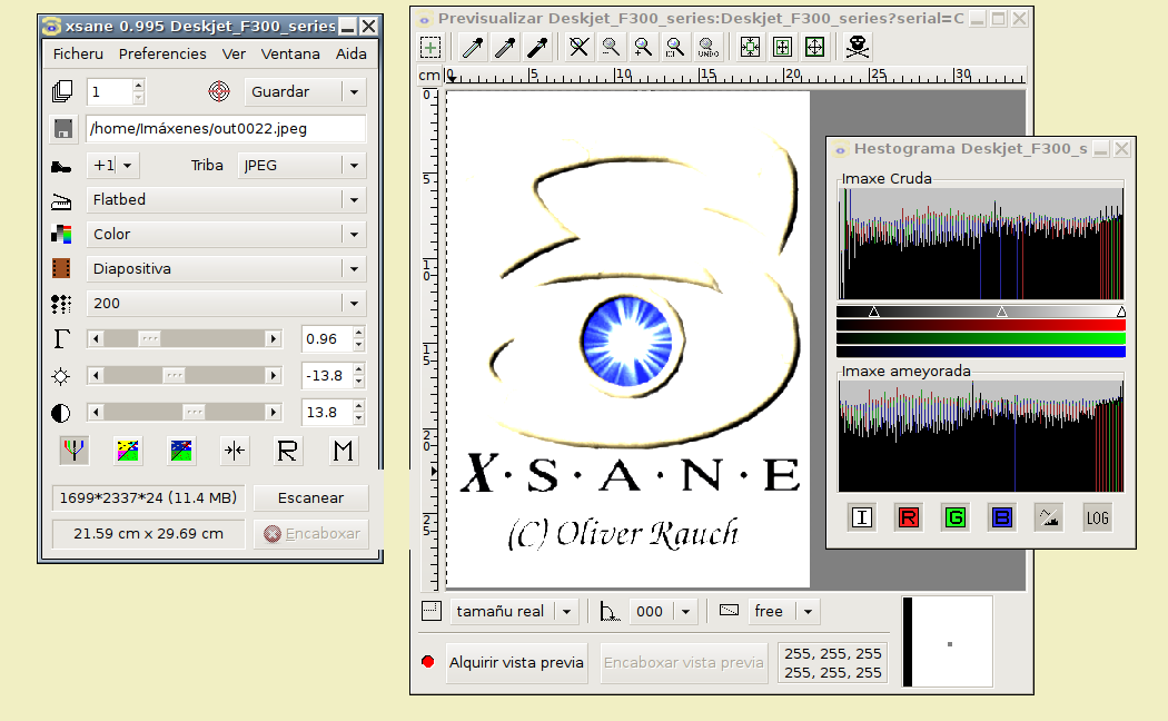 Captura pantalla de Xsane n'asturianu